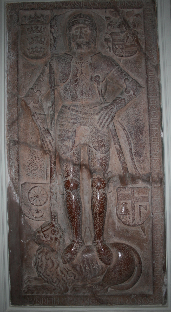 Nadgrobna ploča vojvode Lovre Iločkog (1459-1524) u Crkvi svetog Ivana Kapistrana u Iloku, Hrvatska Gravestone of the duke Nikola Iločki (1459-1524) in the St. John of Capistrano Church in Ilok, Croatia